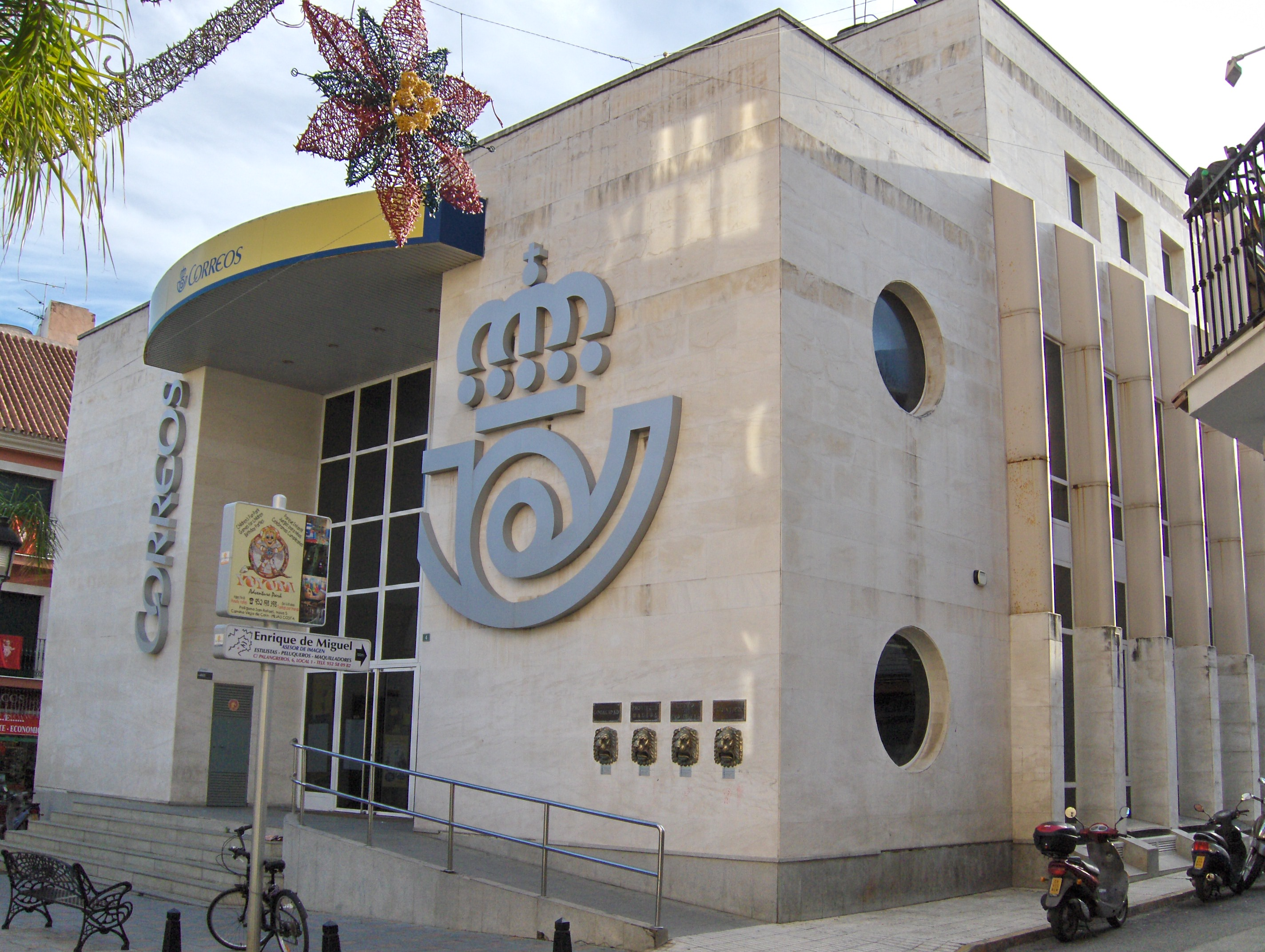 Sede de Correos de Fuengirola, España.